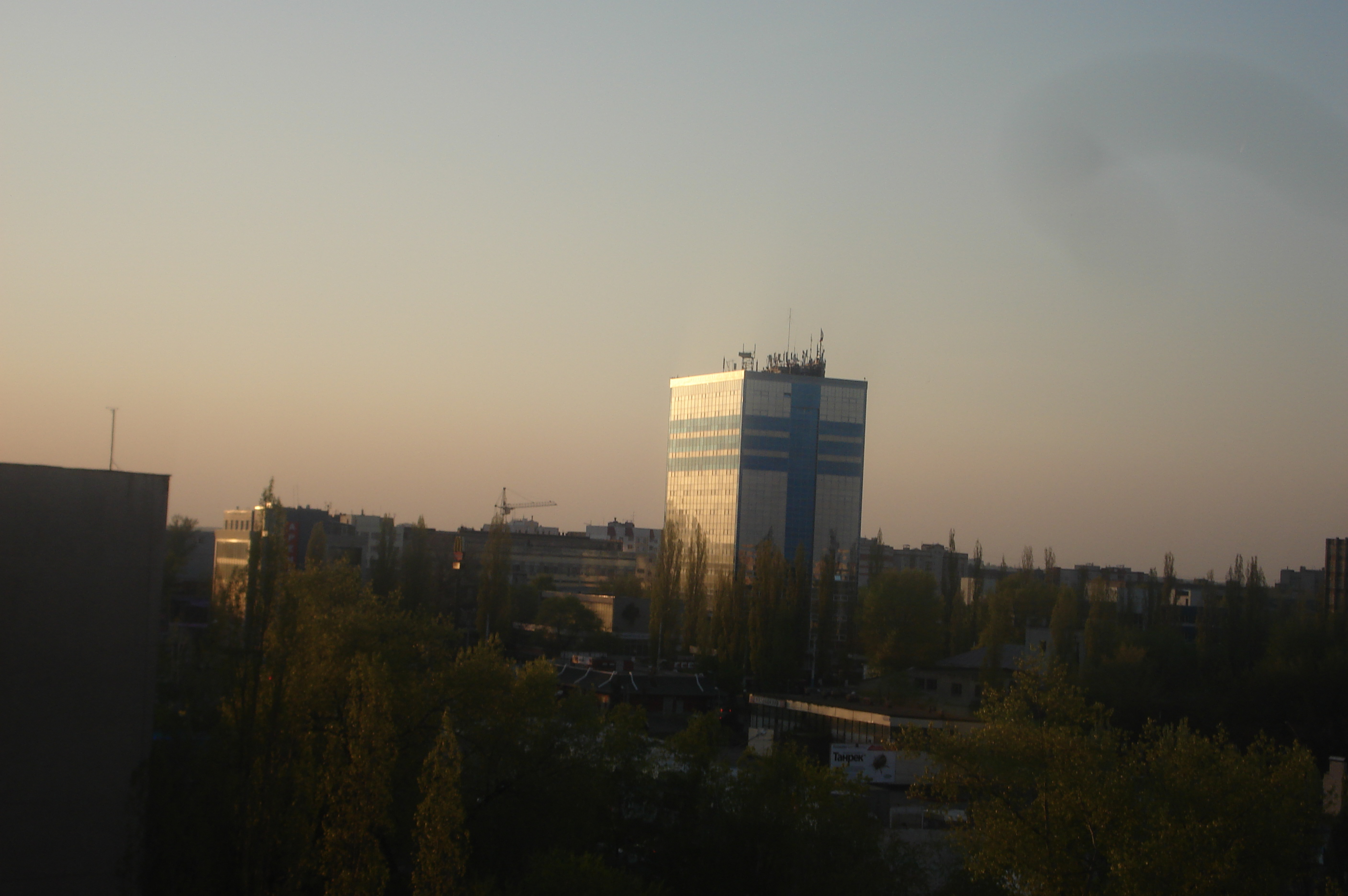 Вид на Железнодорожный район Воронежа с дома по улице Димитрова, 70